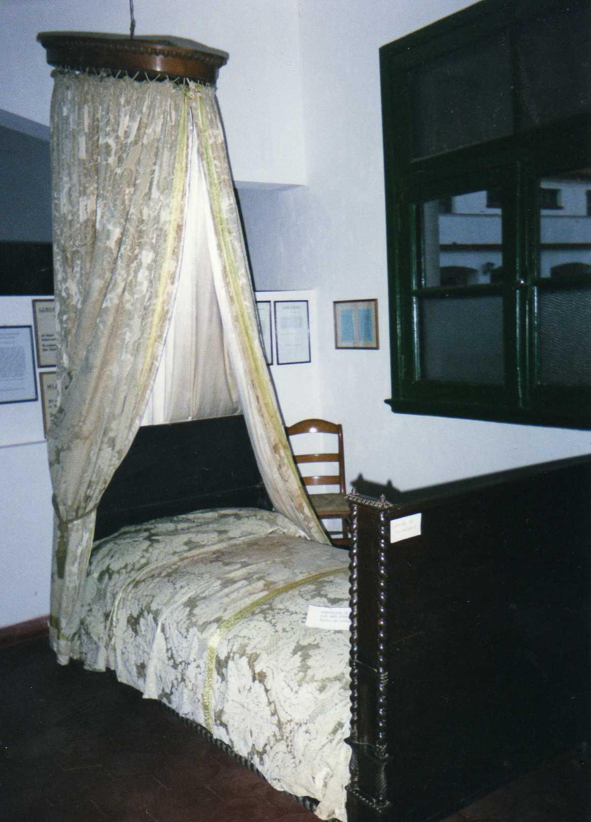 Cama usada por San Martín, en el Museo Sanmartiniano de la localidad de Yapeyú, en Corrientes.